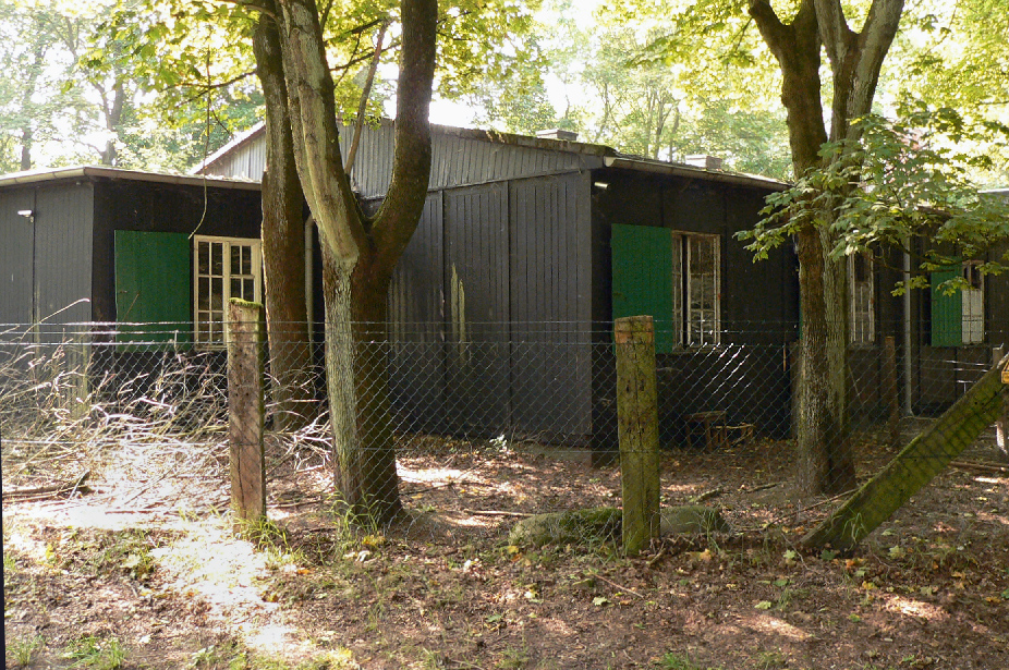 Baracken der Krankenstation in Camp Reinsehlen